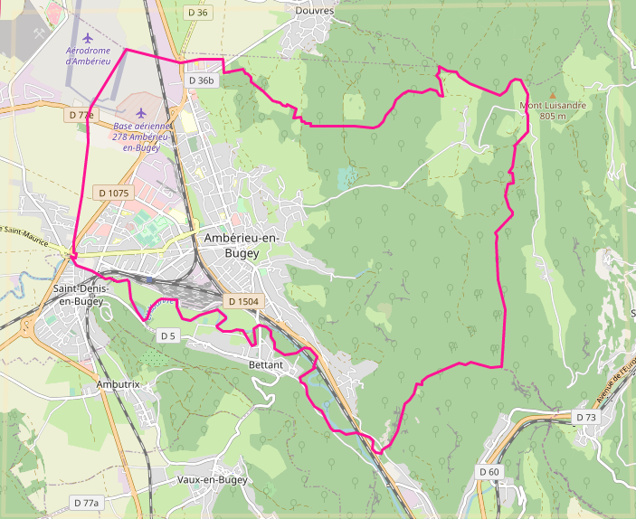 carte réalisée sur umap This map may be incomplete, and may contain errors. Don't rely solely on it for navigation.